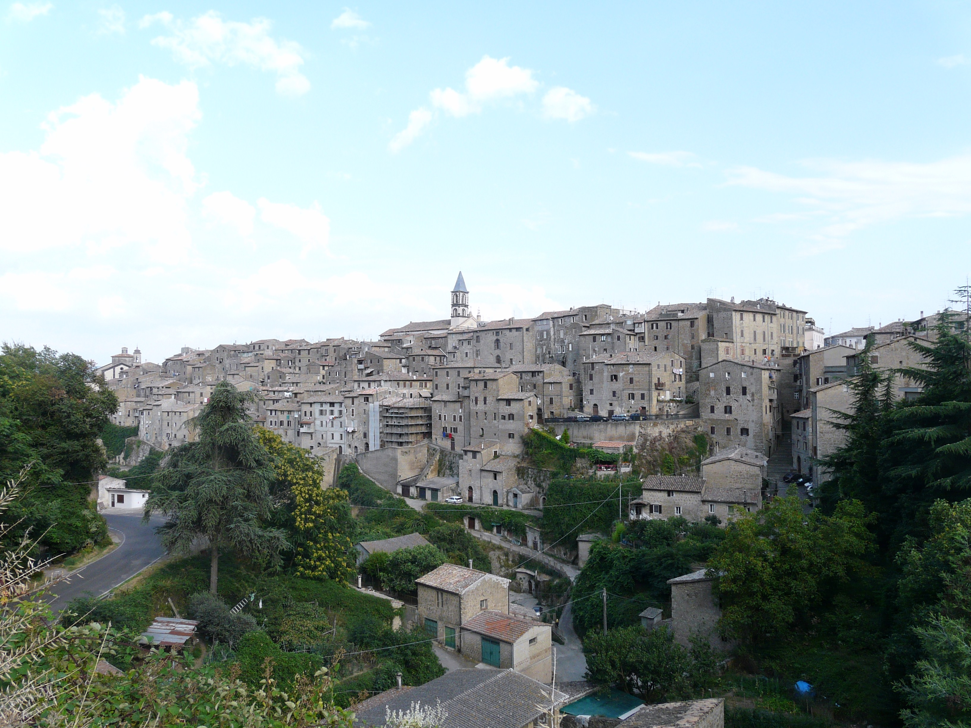 Panorama di Grotte di Castro, Lazio, Italia